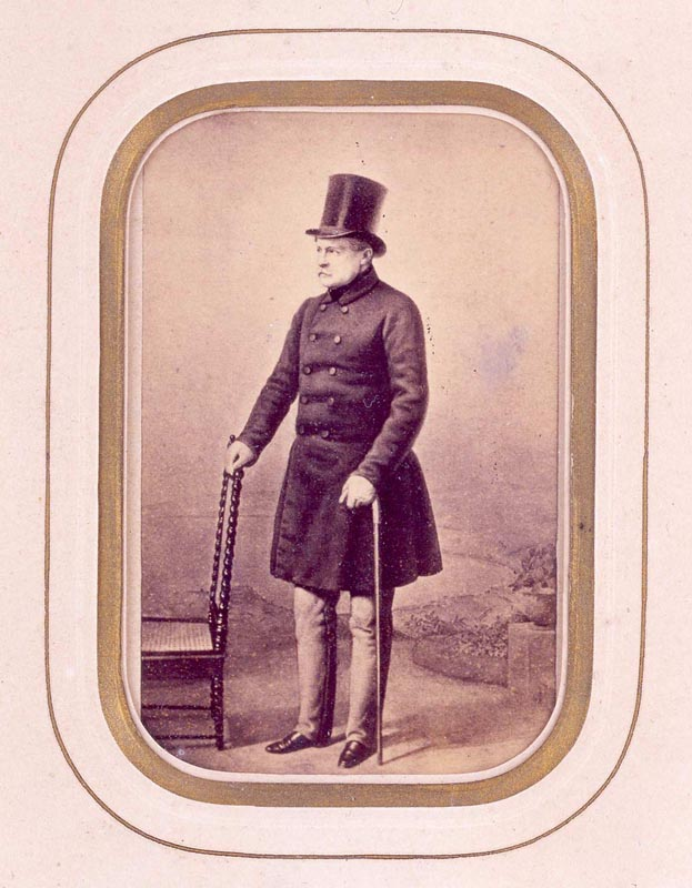 König Wilhelm von Württemberg, Fotografie, 18,2 cm hoch (mit Rahmen), Landesmuseum Württemberg, Inv. 13703a